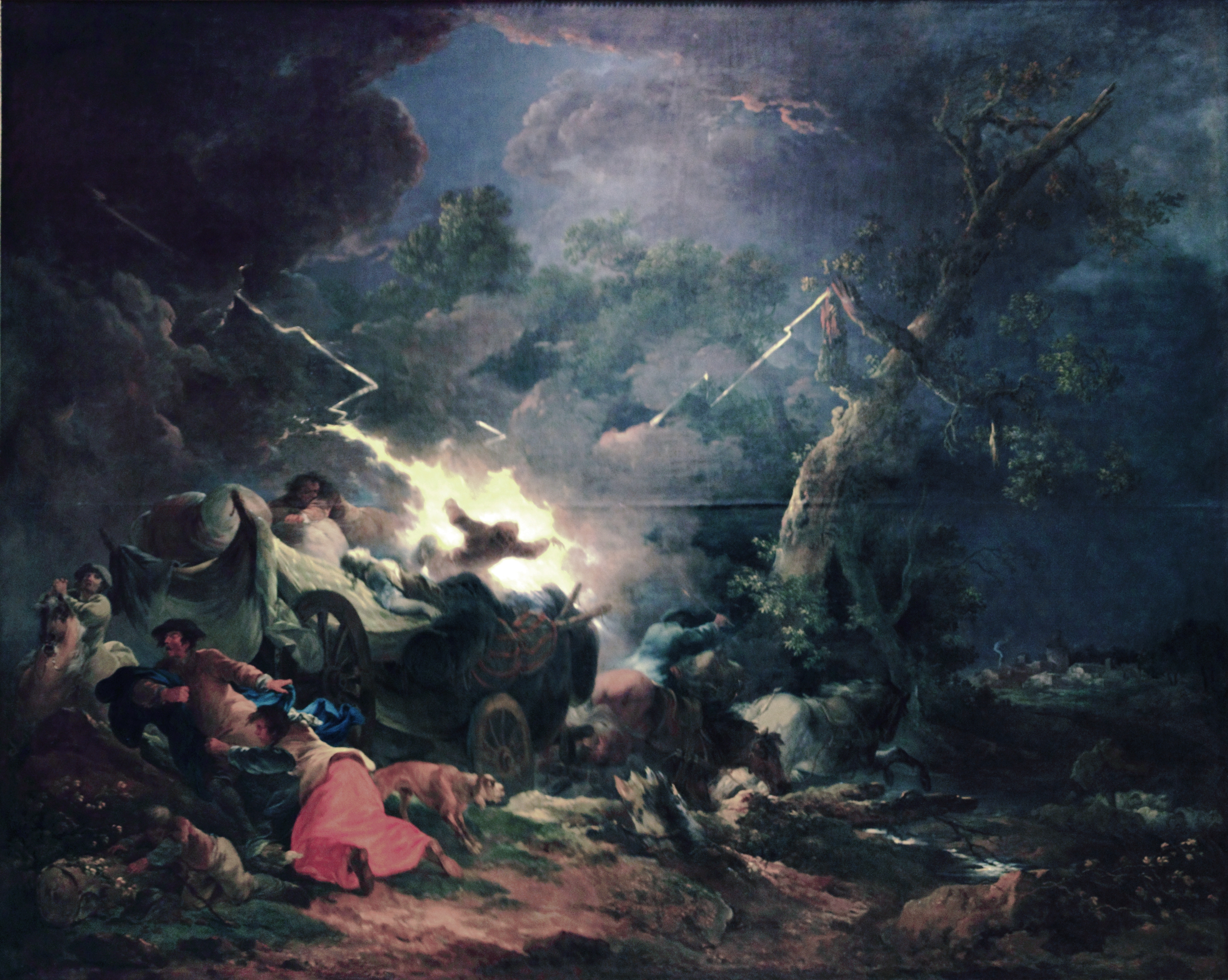 Vendue, avec Rupture d'un pont de bois, Attaque de brigands pendant la nuit" et Voyageurs pris dans un ouragan en 1773 à Jean Benjamin de Laborde, premier valet de chambre de Louis XV pour 24 000 livres. Elles ont été exposées à Versailles en 1775 dans les appartements du ministre des Affaires étrangères.